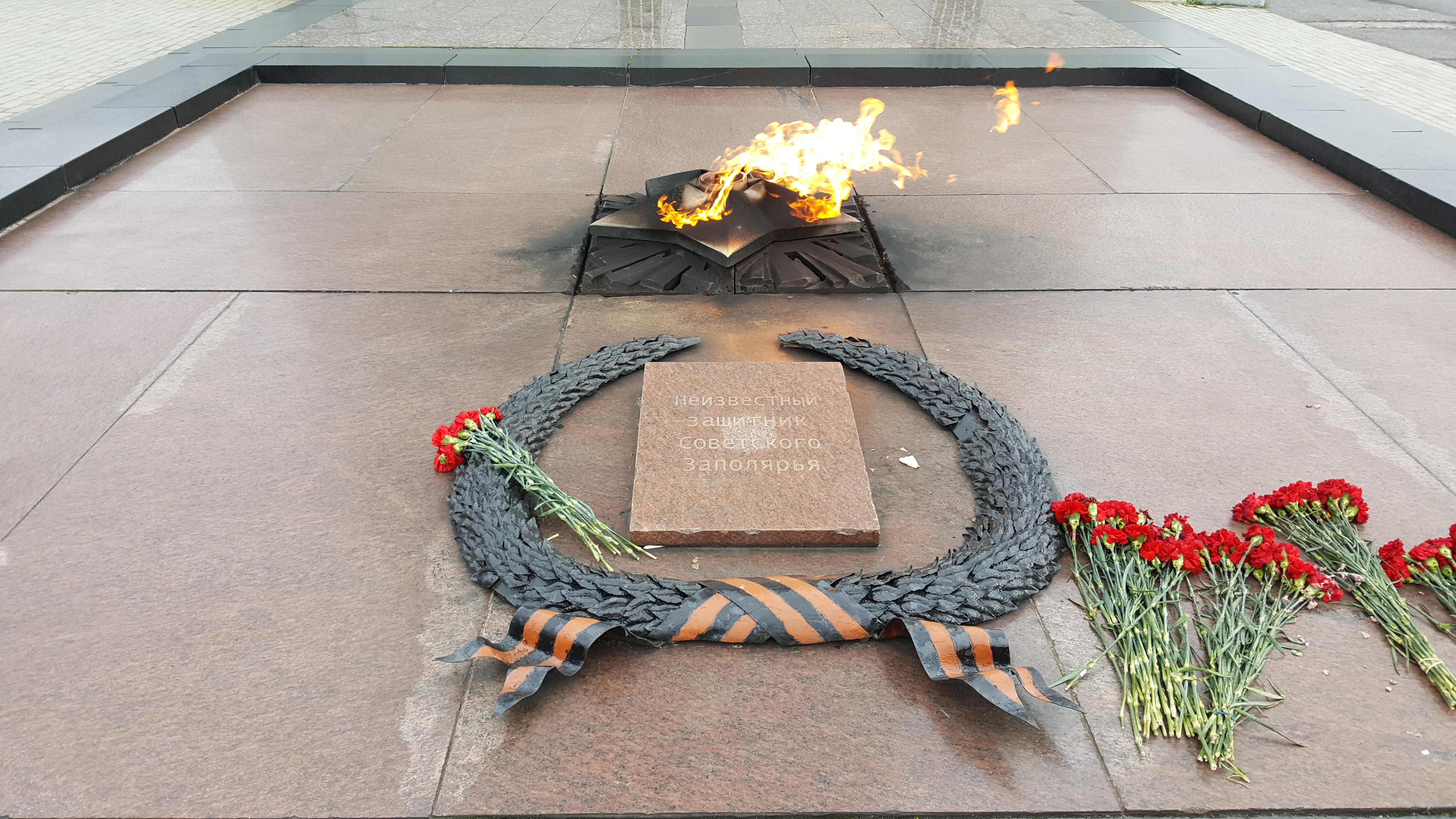 Памятник Защитникам Советского Заполярья («Алёша»): улица Аскольдевцев, сопка Зелёный Мыс, Мурманск, Мурманская область